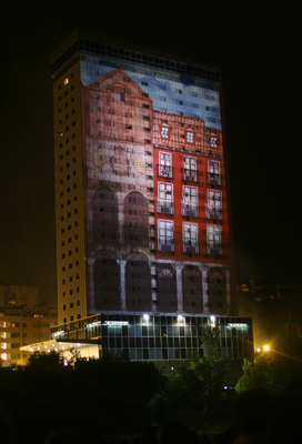 Edificio Duque de Lerma de Valladolid durante las Fiestas de Nuestra Sra. de San Lorenzo